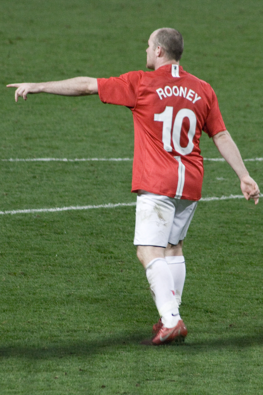 Wayne Rooney